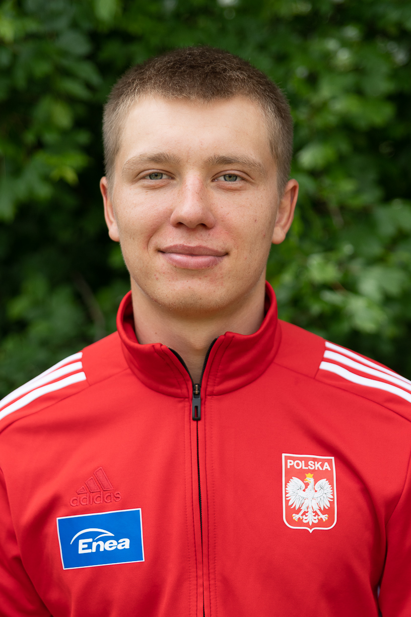 Polski wioślarz Fabian Barański 2019